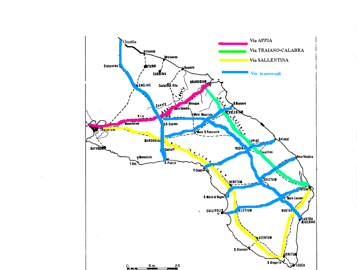 Rete viaria salento messapico